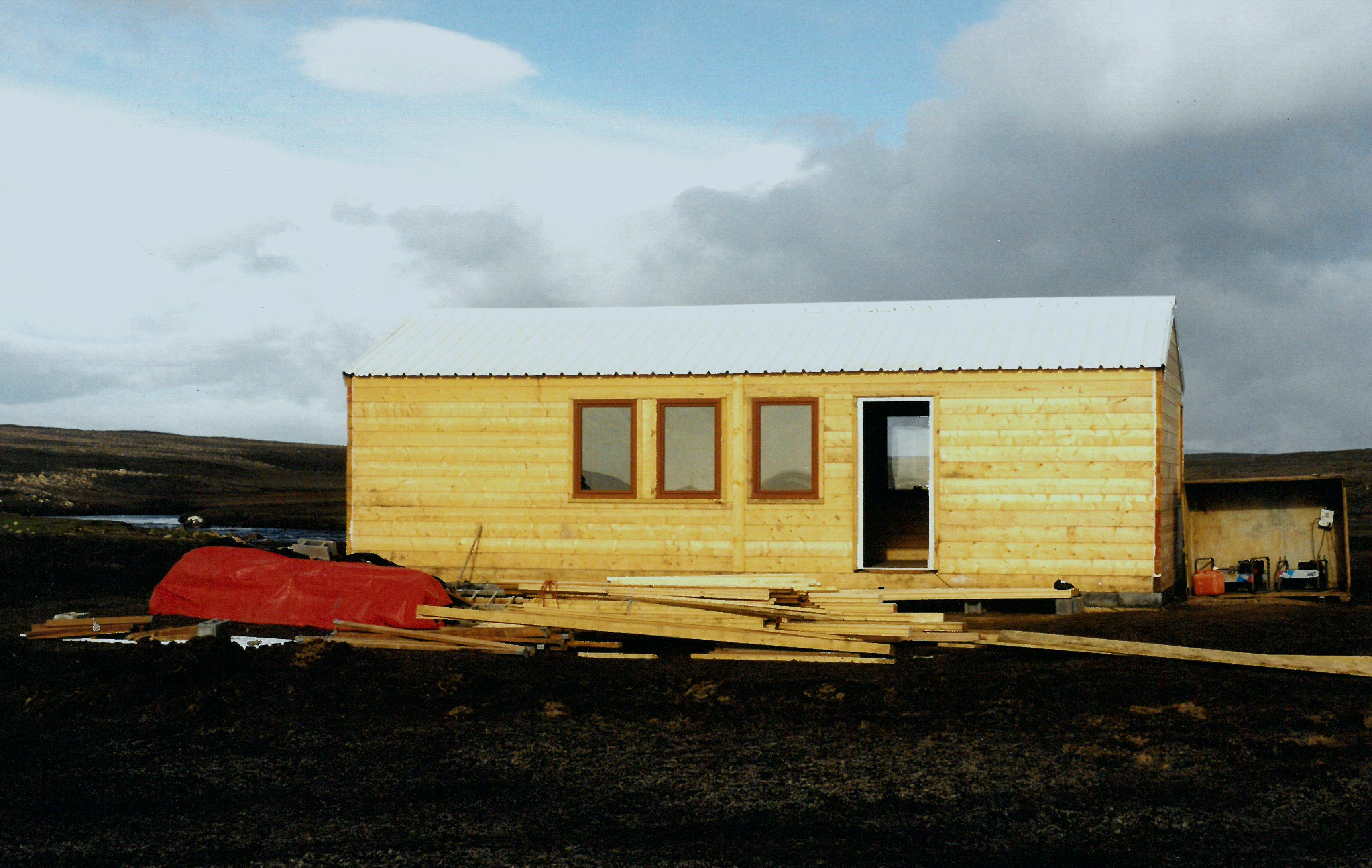 Construction en 1999 de la cabane de la rivière des Manchots (près du cap Ratmanoff)